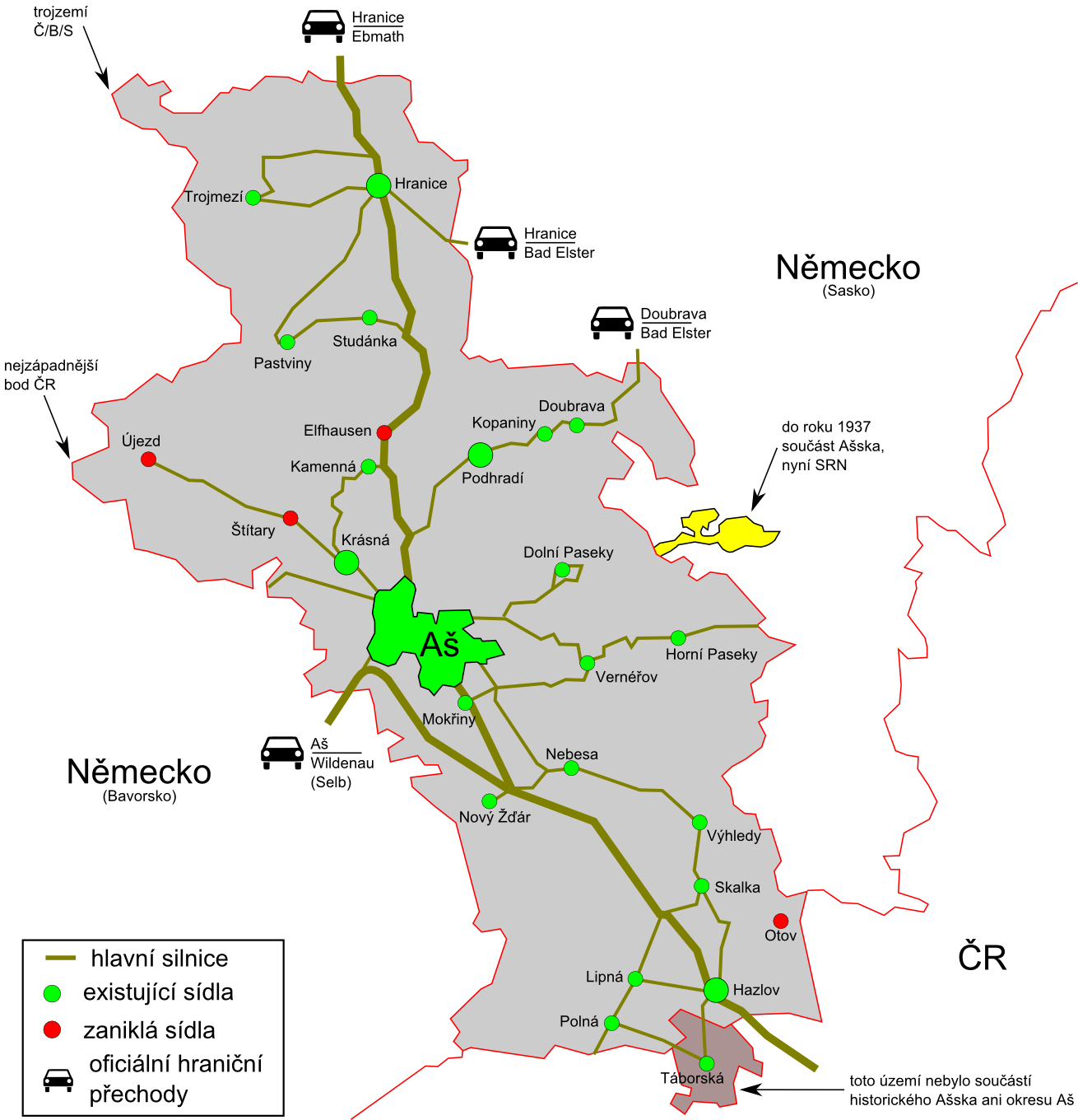 Ašsko, Ašský výběžek, bývalý okres Aš